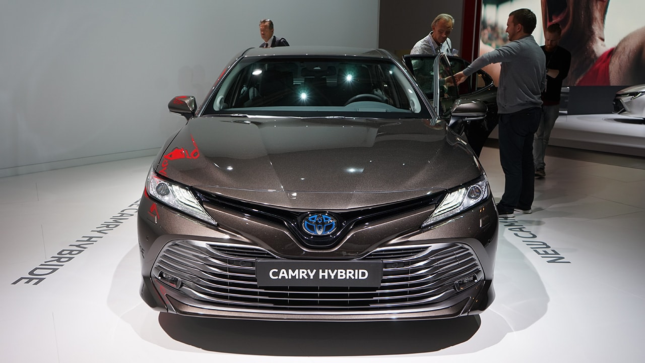 Toyota Camry Paris Motor Show 2018